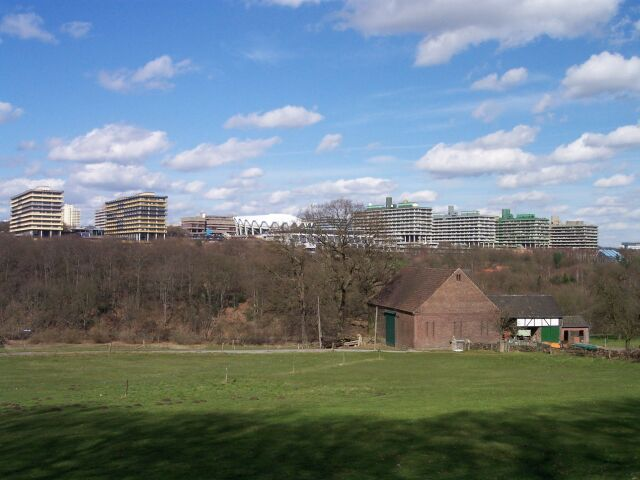 Ruhruniversität Bochum